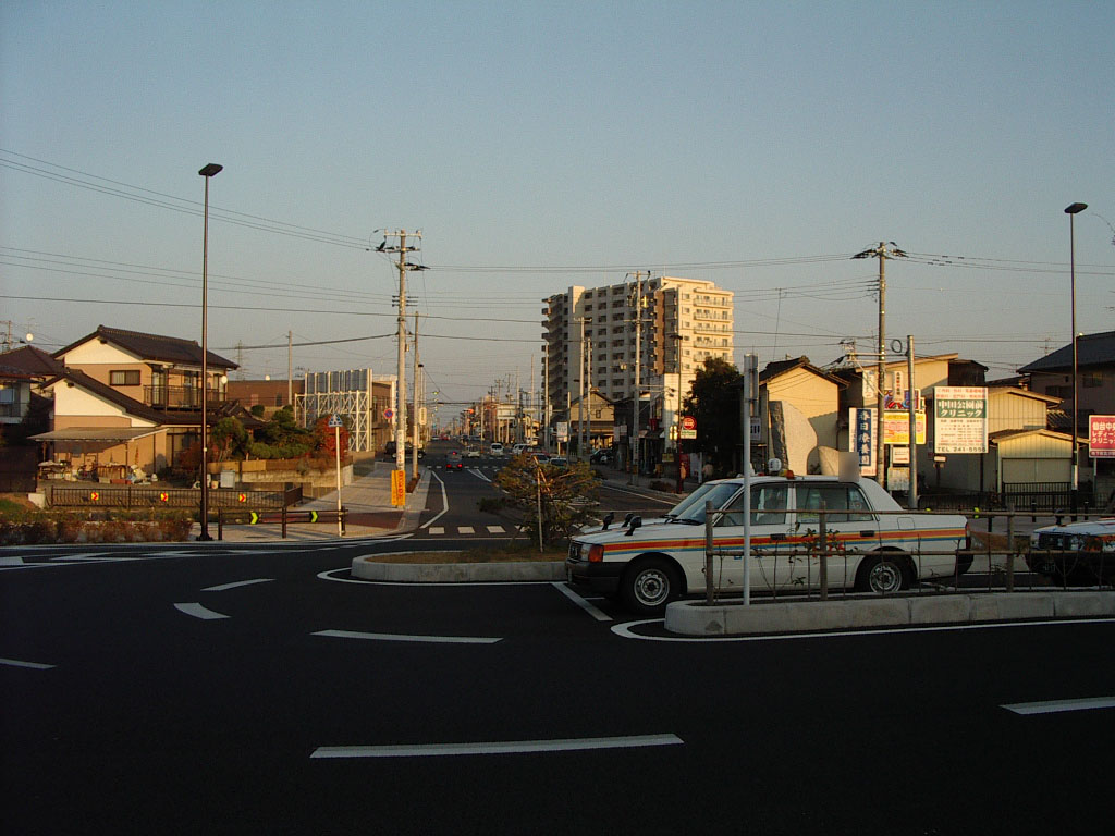 東北本線南仙台駅